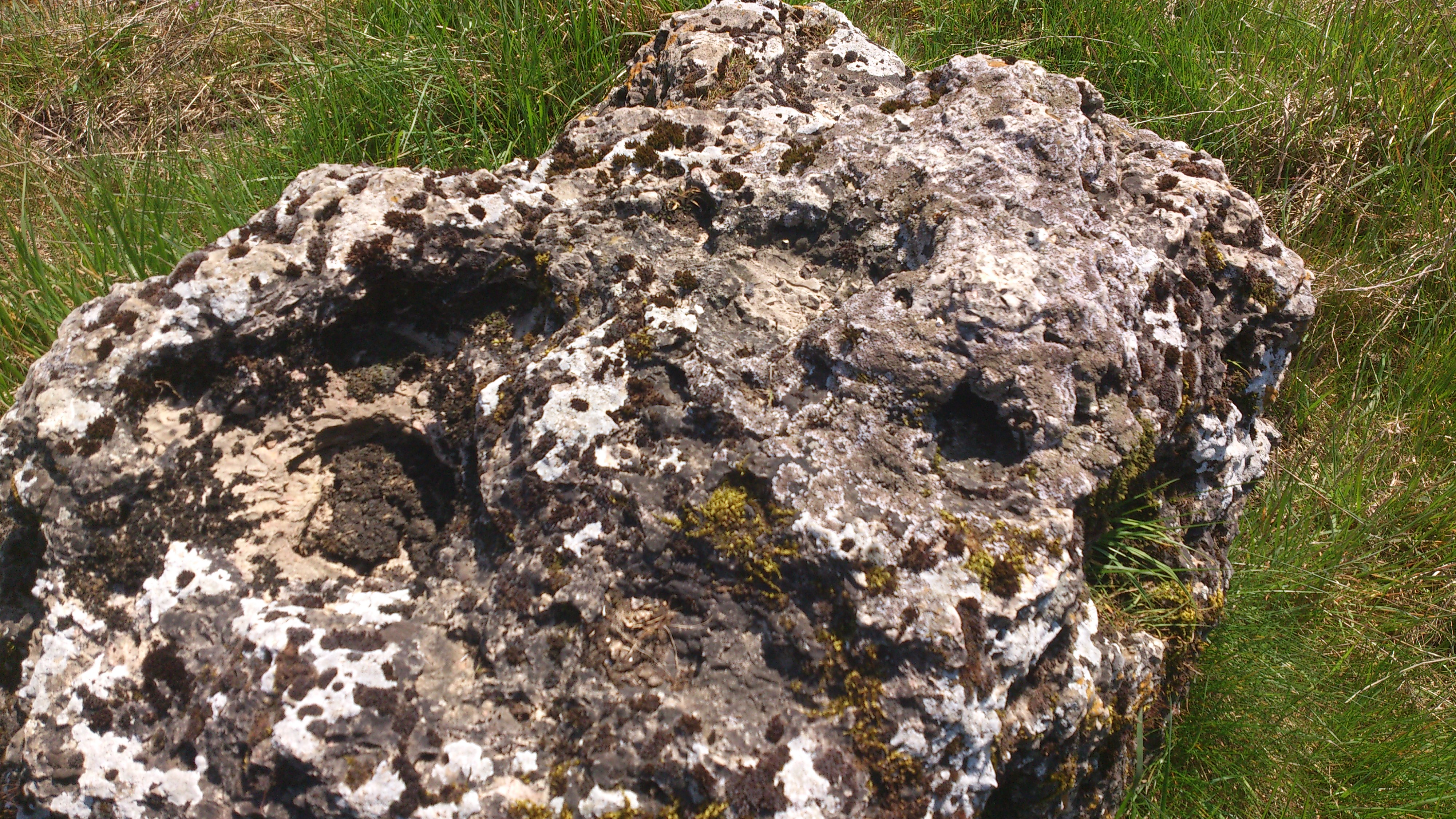 Voici une pierre où coulerait de l'eau rouge.